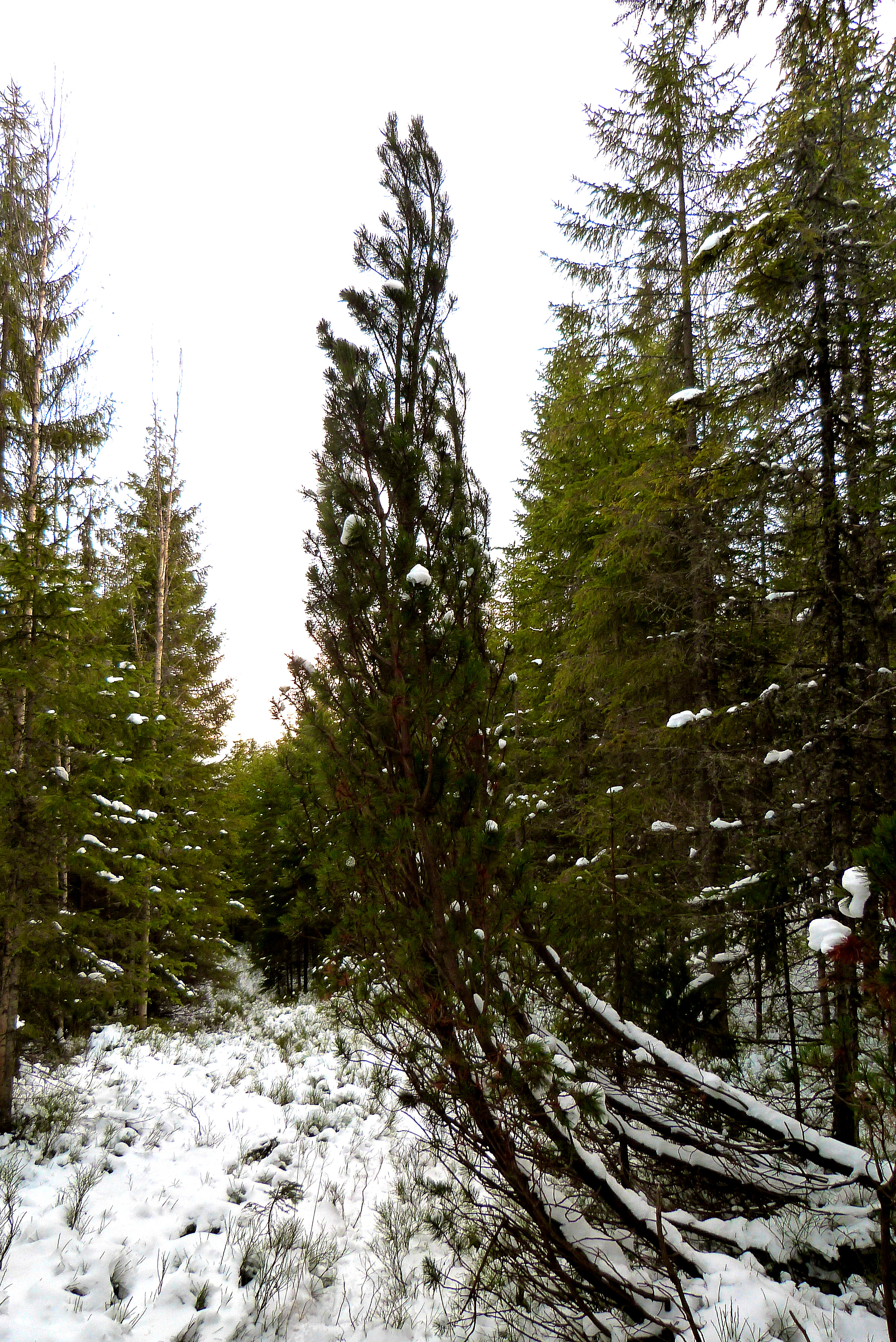 Жереп під Паренками